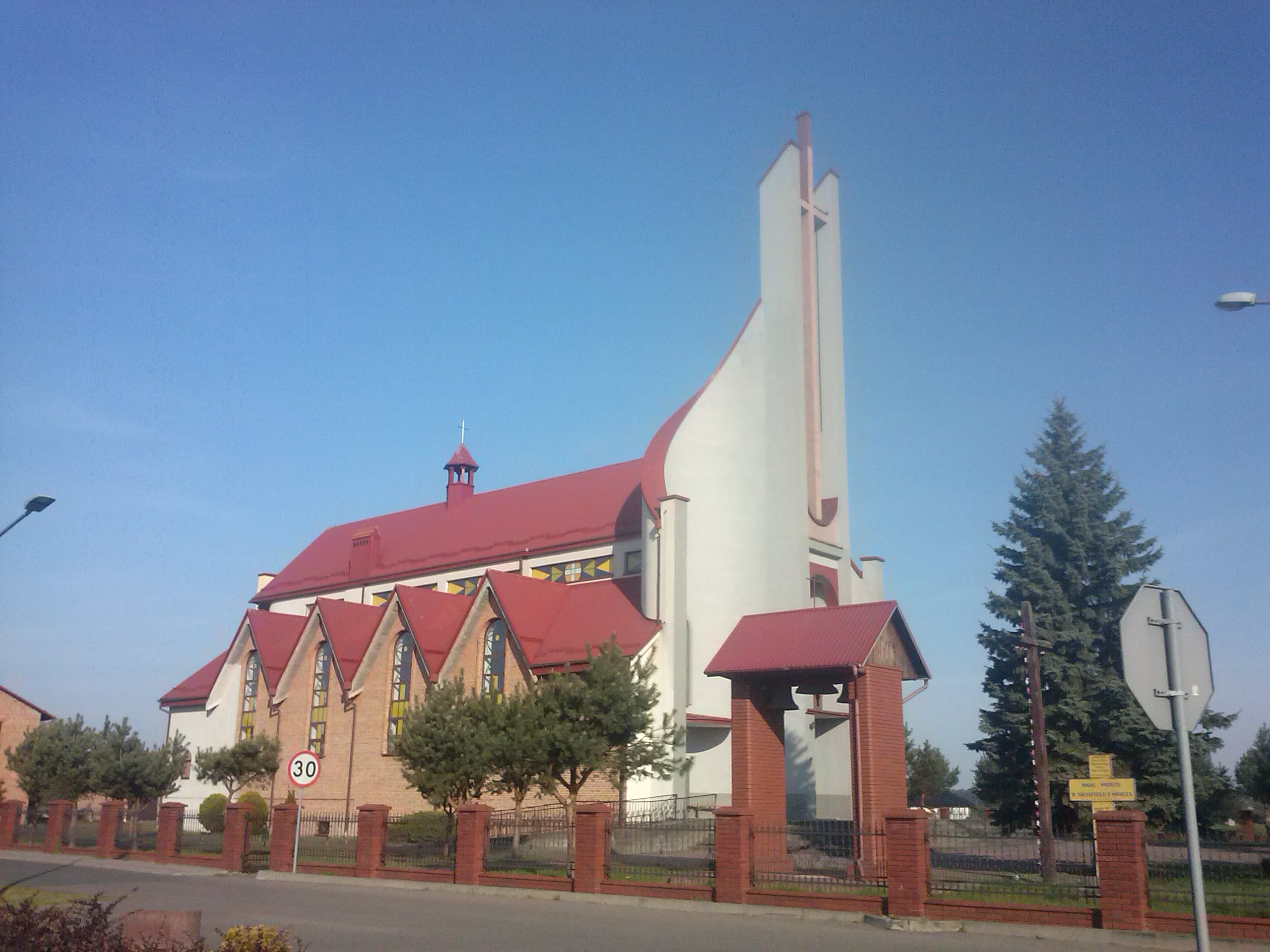 Kościół parafialny pw. NSPJ w Gorzycach (zbudowany w latach 1997-2001).